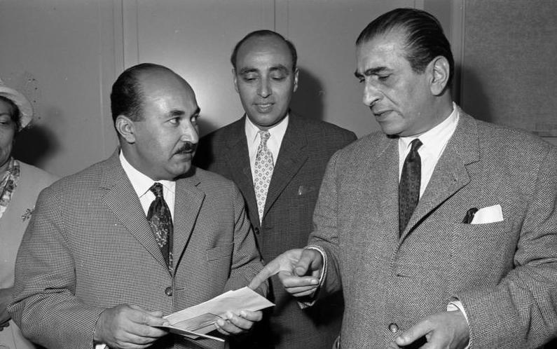 Persischer Landwirtschaftsminister Arsandjani bei einer Presse-Konferenz im Hotel Königshof, Bonn